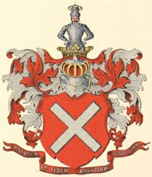 Bredahli suguvõsa aadlivapp